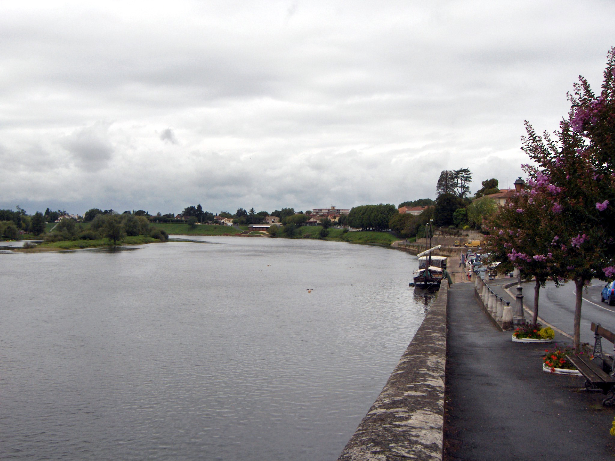 La Dordogne à Bergerac Contents 1 Summary 1.1 Légende 1.2 Auteur 1.3 Description technique 1.4 Source 1.5 Statut 2 Licensing 3 Original upload log Summary Rivière la Dordogne coulant à Bergerac (Dordogne). Légende La Dordogne à Bergerac. Auteur Photographie effectuée par ©éréales Kille® ⌨ ☺ - 25 août 2004 à 13 h 32 Description technique Photographie prise avec un appareil numérique HP Photosmart R707 5,1 MPx. f/4,8, 1/1126 s, ISO 100 Source Archives personnelles. Statut César Alexanian